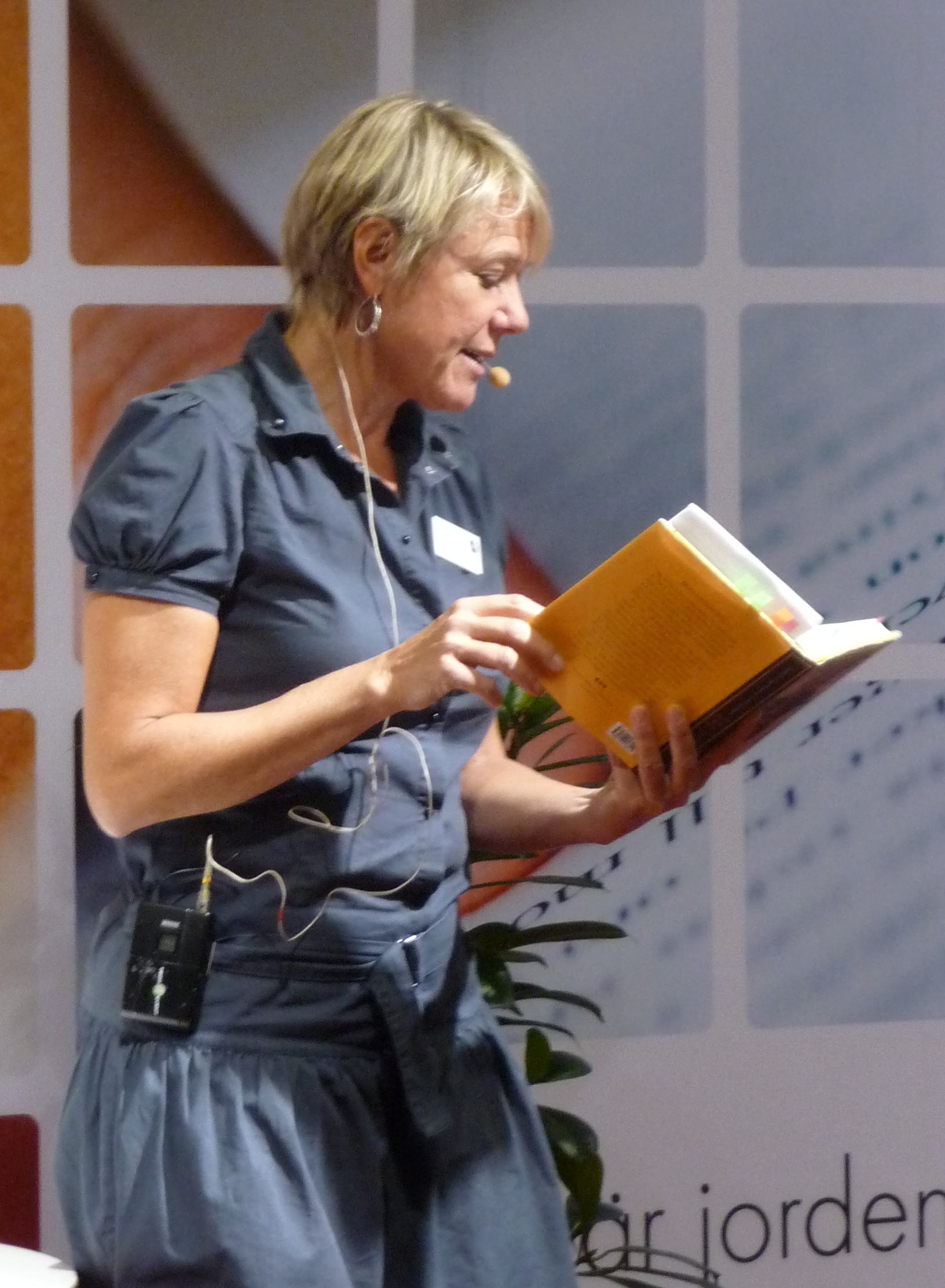 Agneta Lagercrantz på bokmässan i Göteborg 2009.